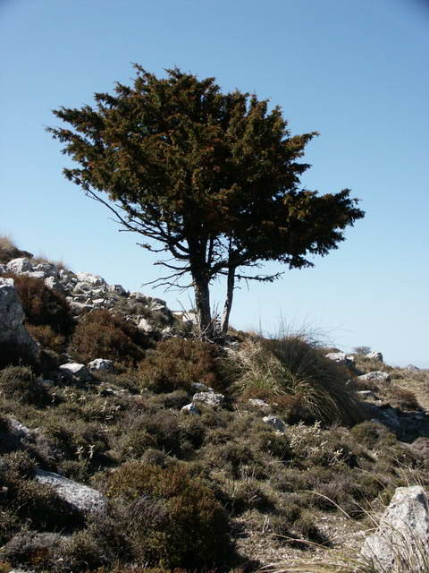 Un Teix (Taxus baccata) al Puig del Teix. Mallorca.